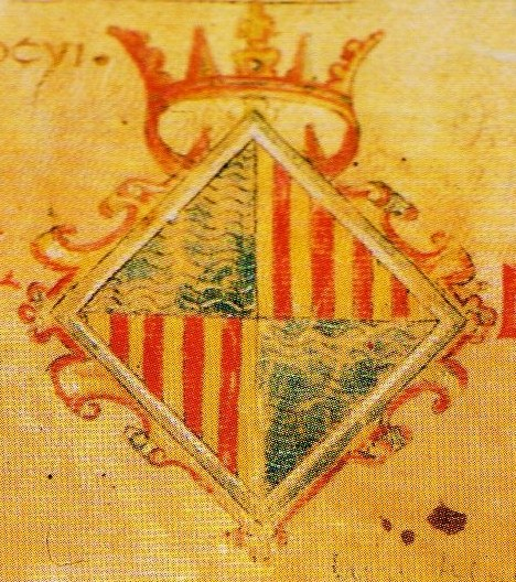 Stemma della città in epoca Catalana